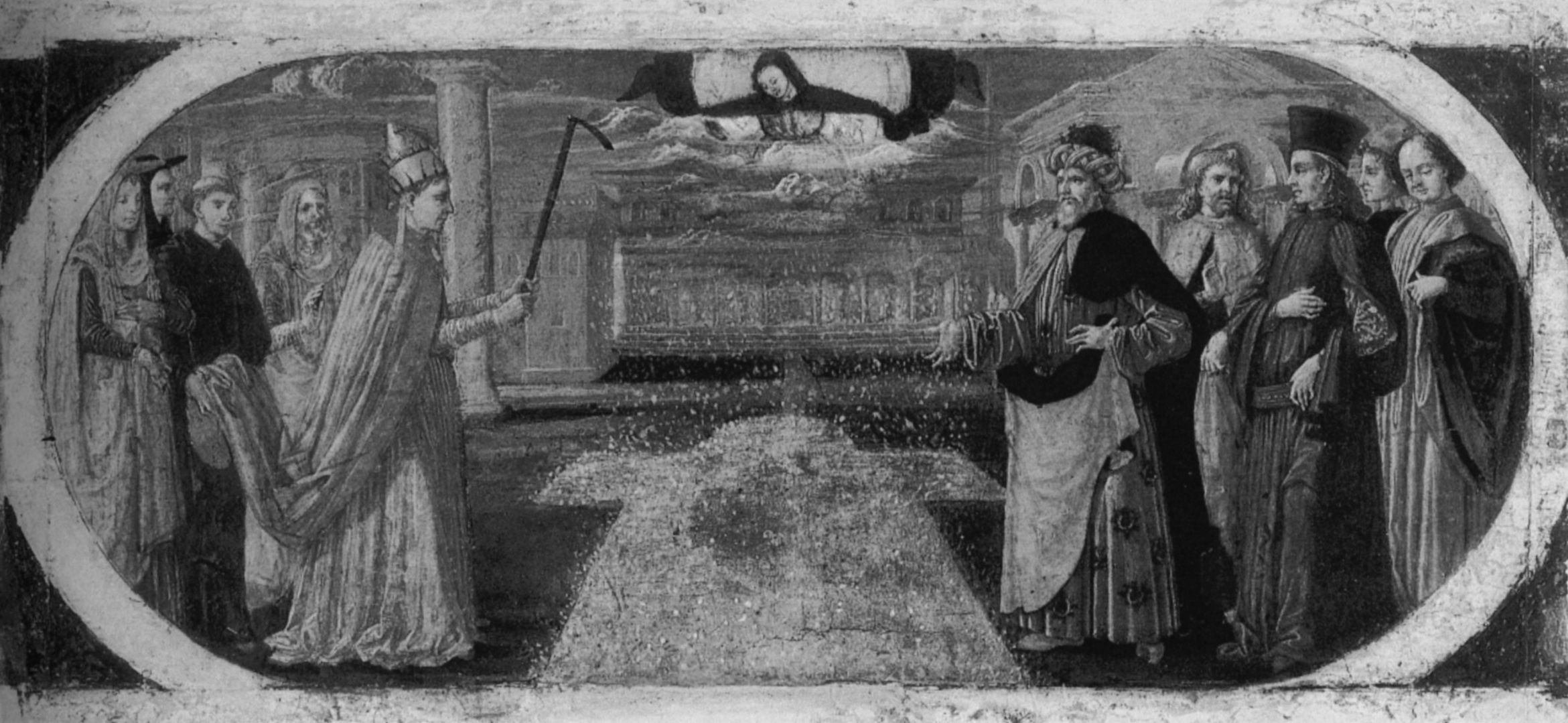 Pietro Perugino: Miracolo della Neve e fondazione di Santa Maria Maggiore. Cat. no. 3 in Vittoria Garibaldi: Perugino. Catalogo completo. Octavo, Firenze 2000, ISBN 88-8030-091-1